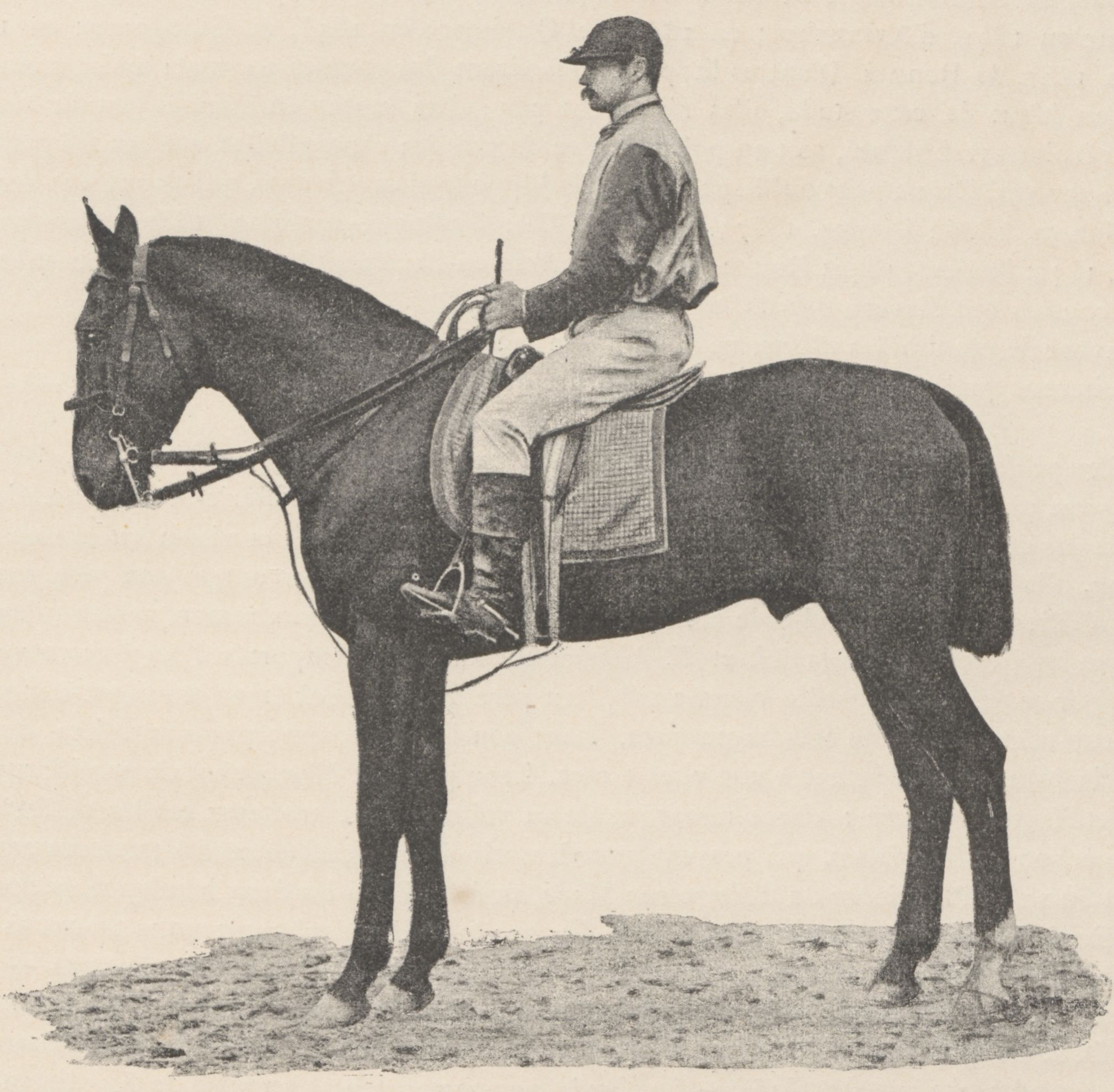 Harley, un étalon noir, fils du trotteur Phaéton et de la jument Turlurette